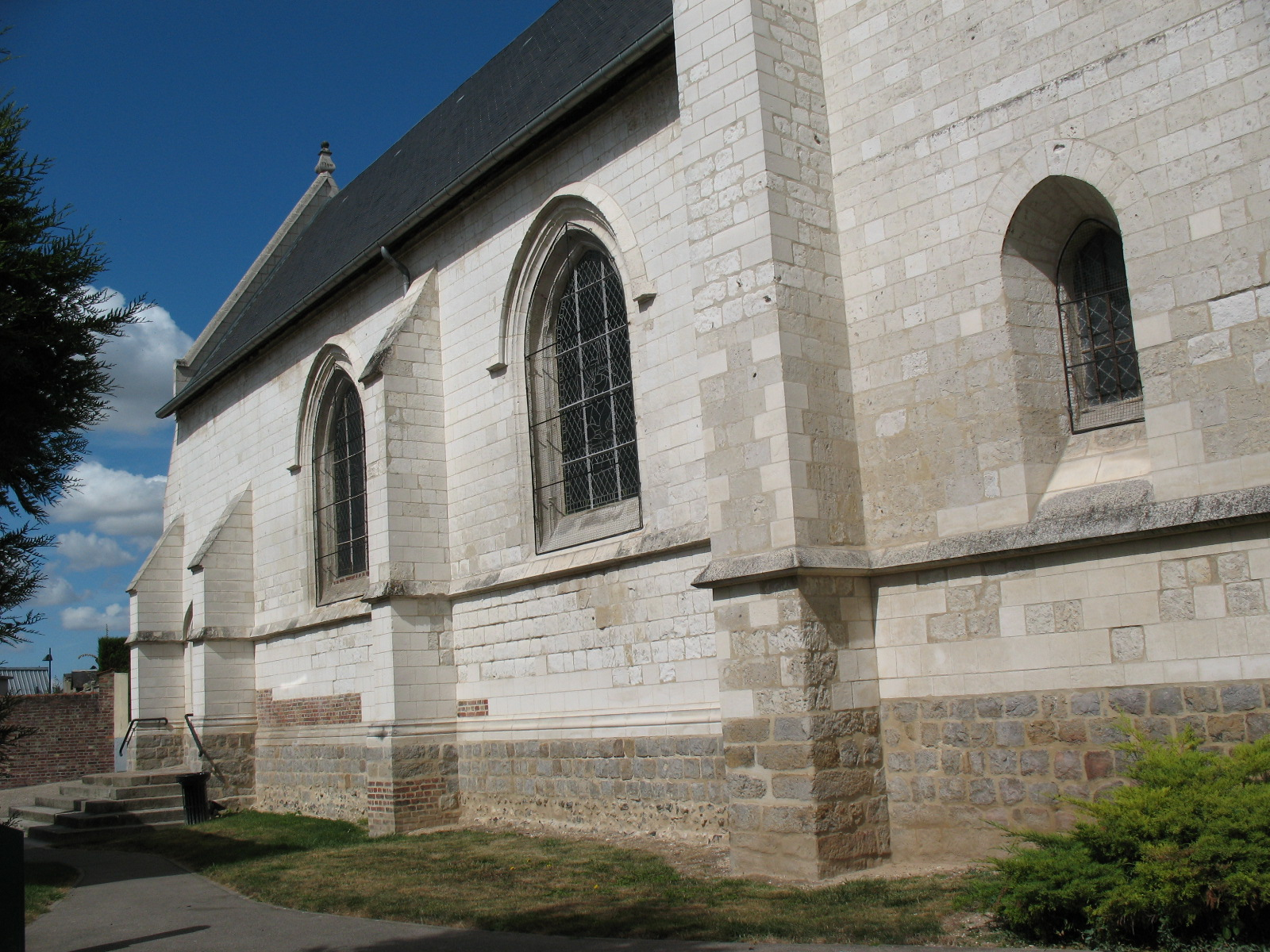 Côté sud de l'église de Camon, en pierre sur soubassement de grès. Les autres côtés ont été restaurés partiellement en briques.